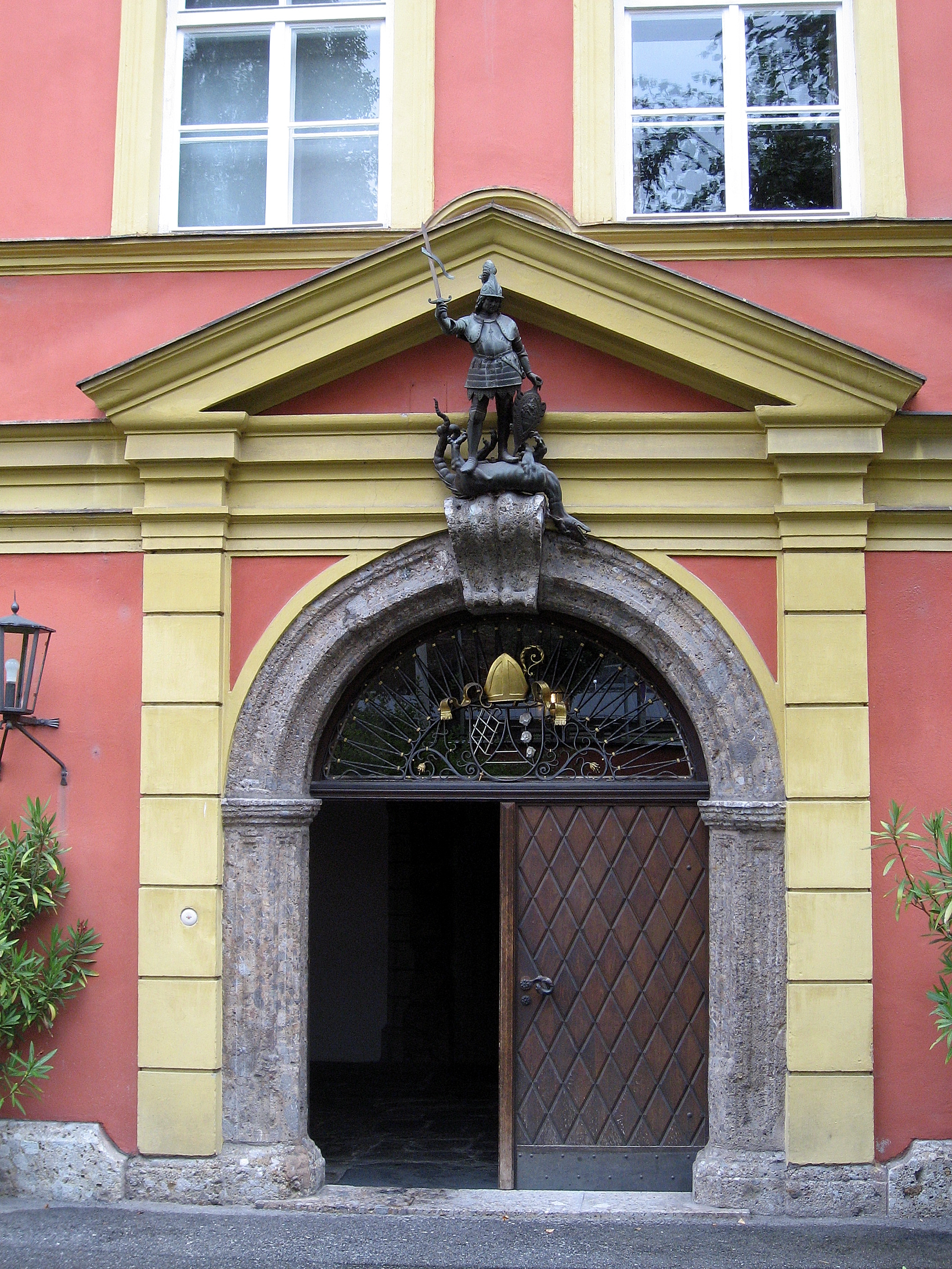 Österreich, Innsbruck, Stift Wilten, Klosterportal